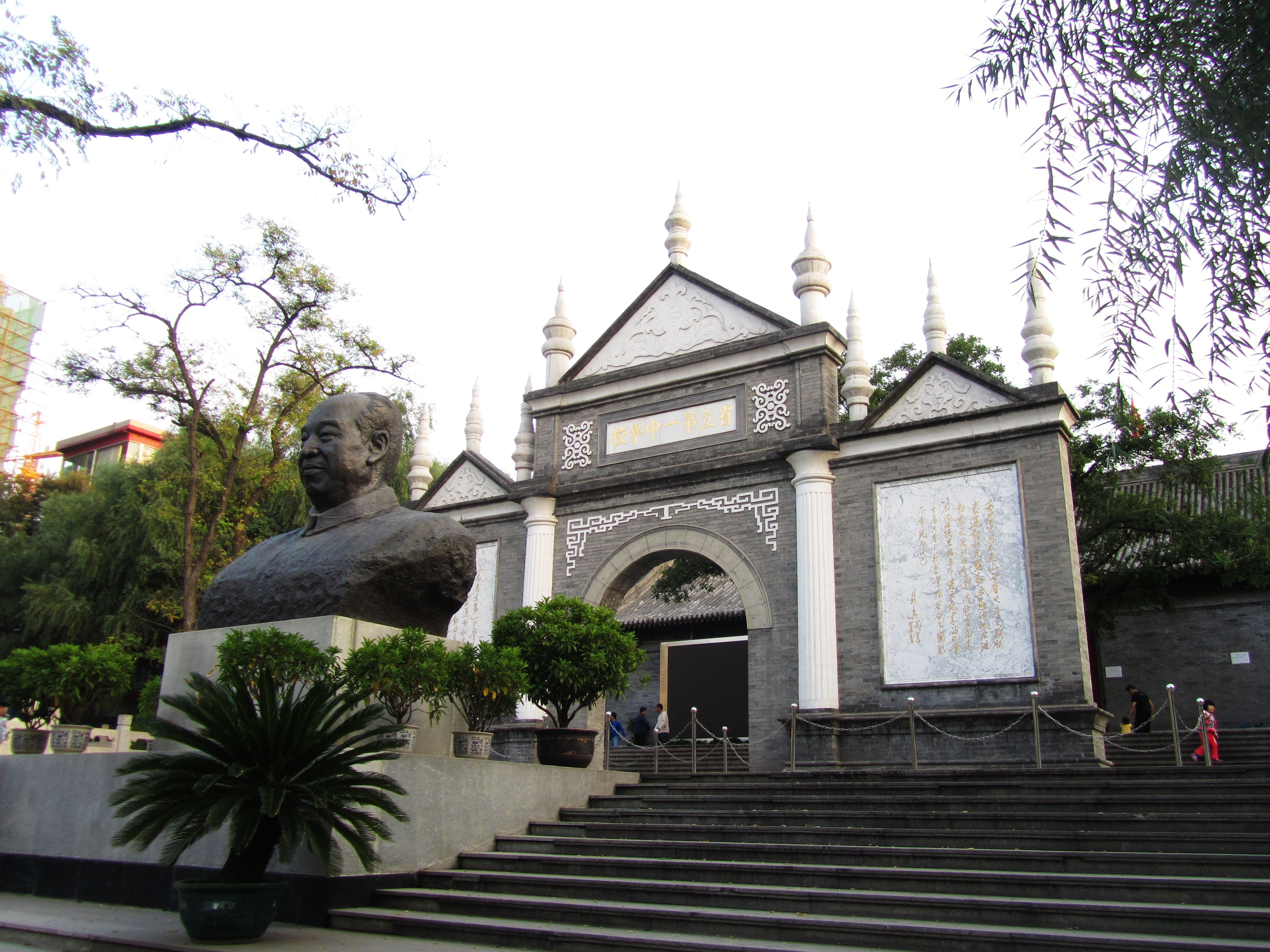 山西省立第一中学旧址，彭真像及牌坊。